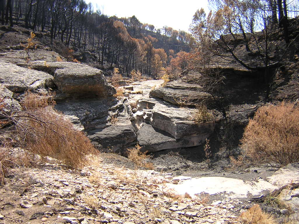 El Gorg Negre (Monistrol de Calders, Moianès)